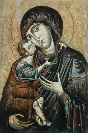 Die Hl. Maria, Mutter Gottes; Byzantinische Ikone aus Zvonik im heut. Kroatien.